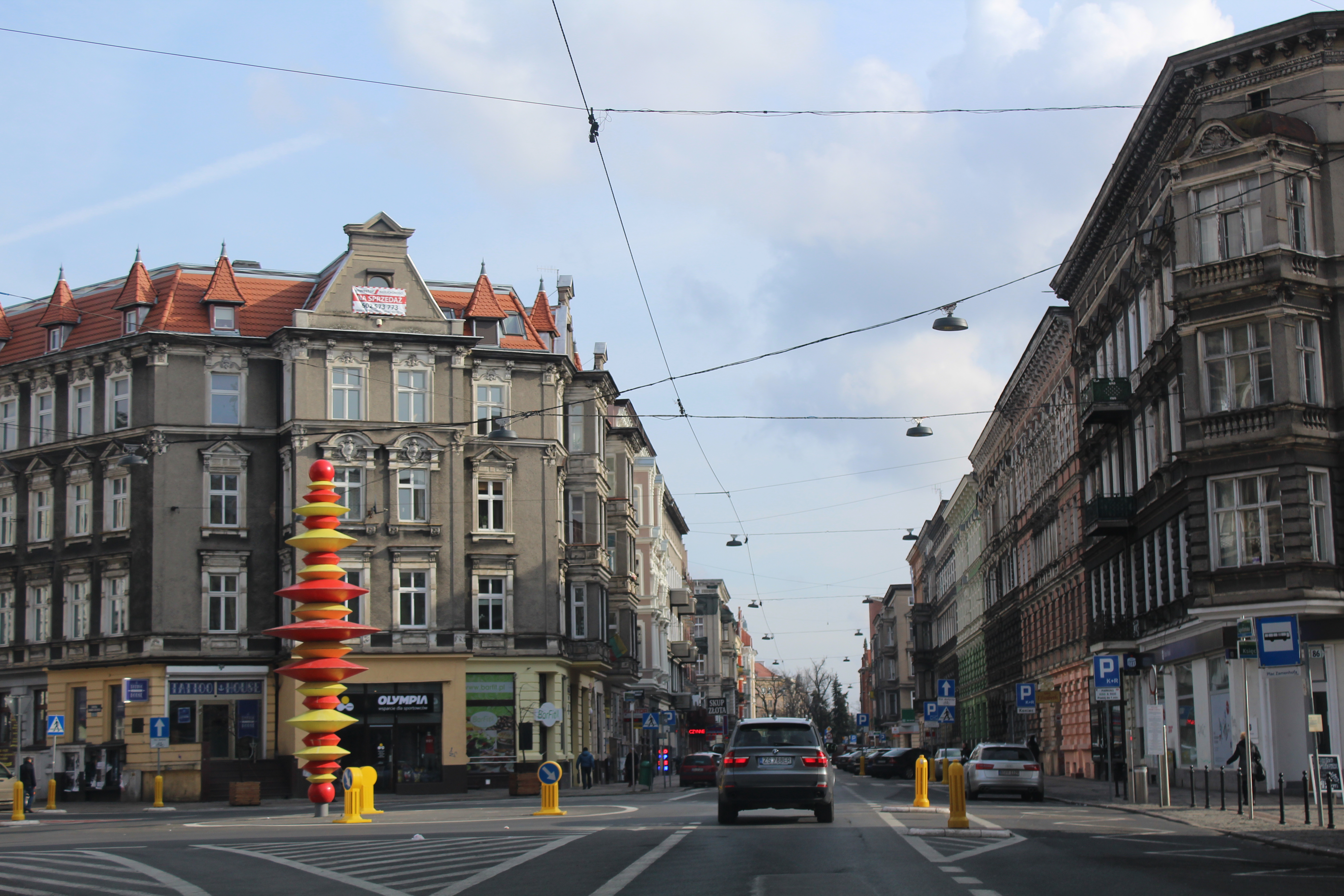 Plac Zamenhofa i ul. Jagiellońska w Szczecinie